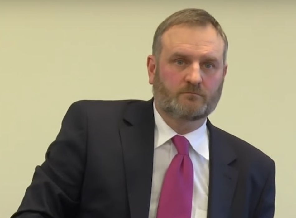 Dyrektor Szpitala Powiatowego SPW ZOZ w Stargardzie Paweł Bakun (2017)